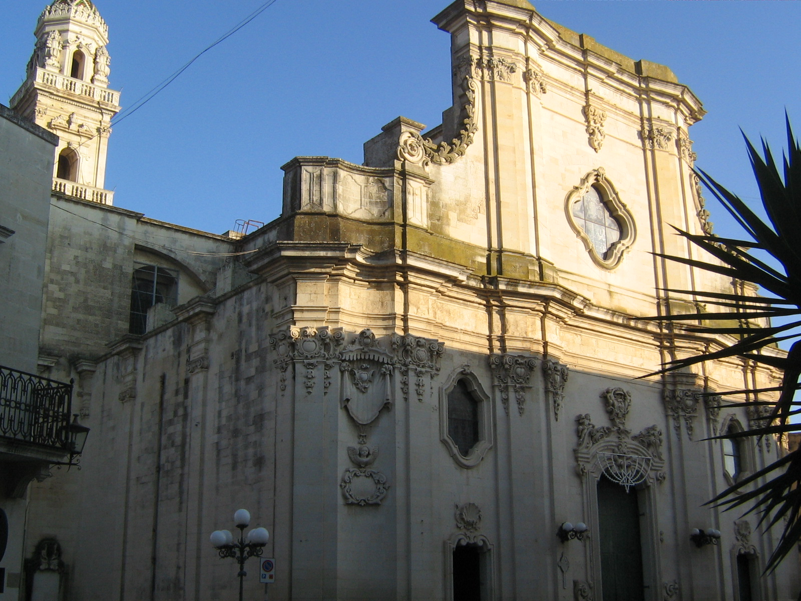 Maglie: il Duomo di San Nicola.